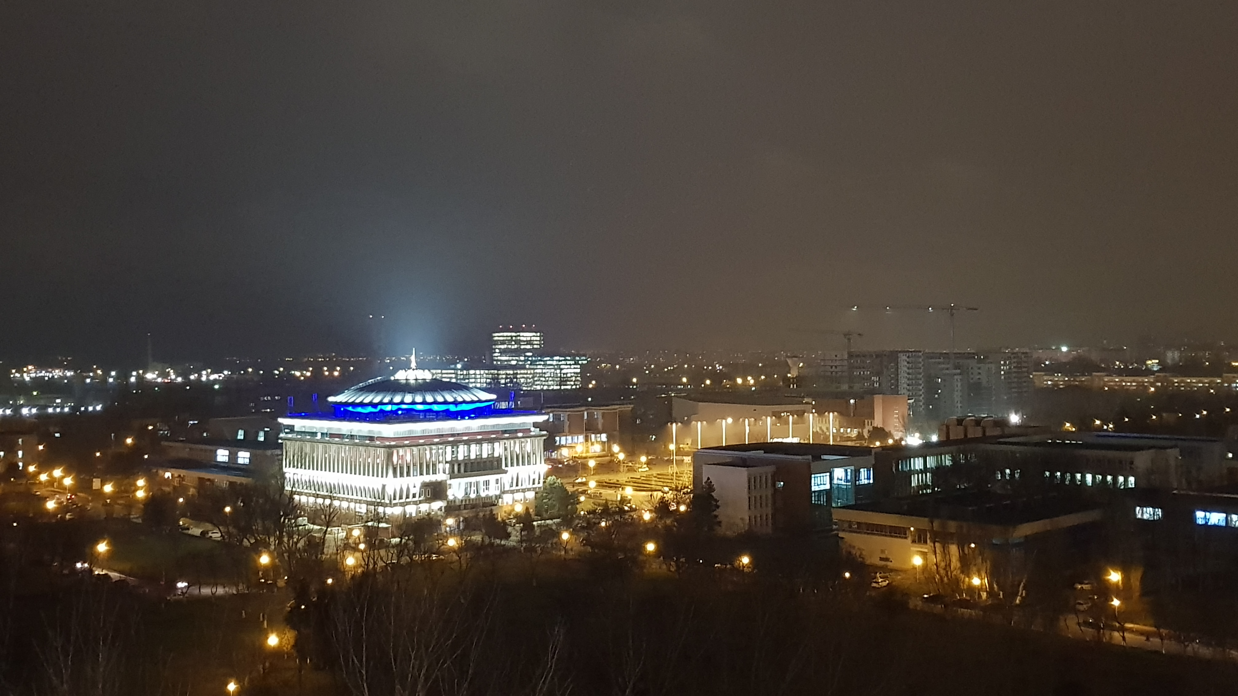 Rectoratul Politehnicii București